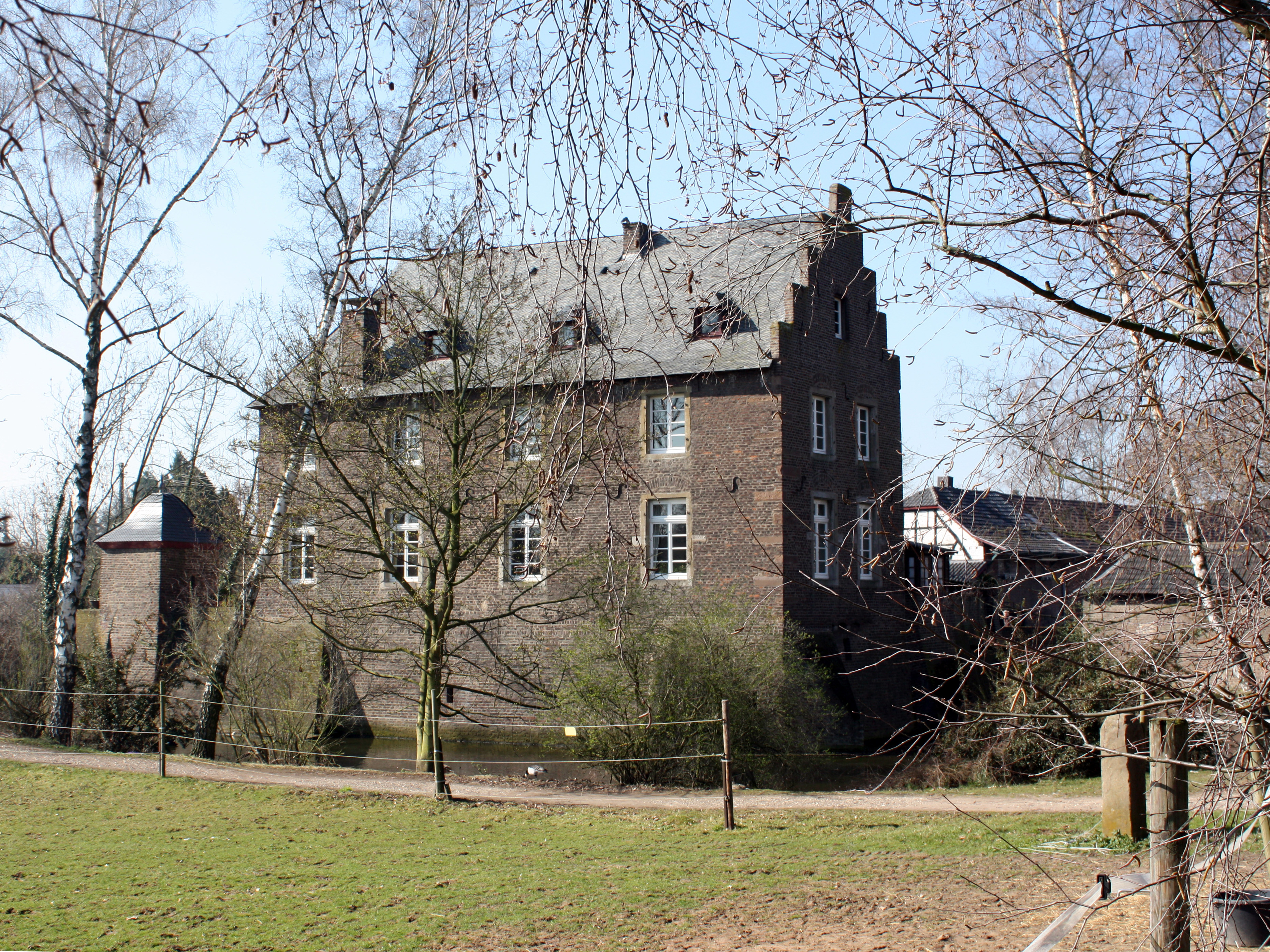 Burg-Redinghoven, Friesheim (Erftstadt)